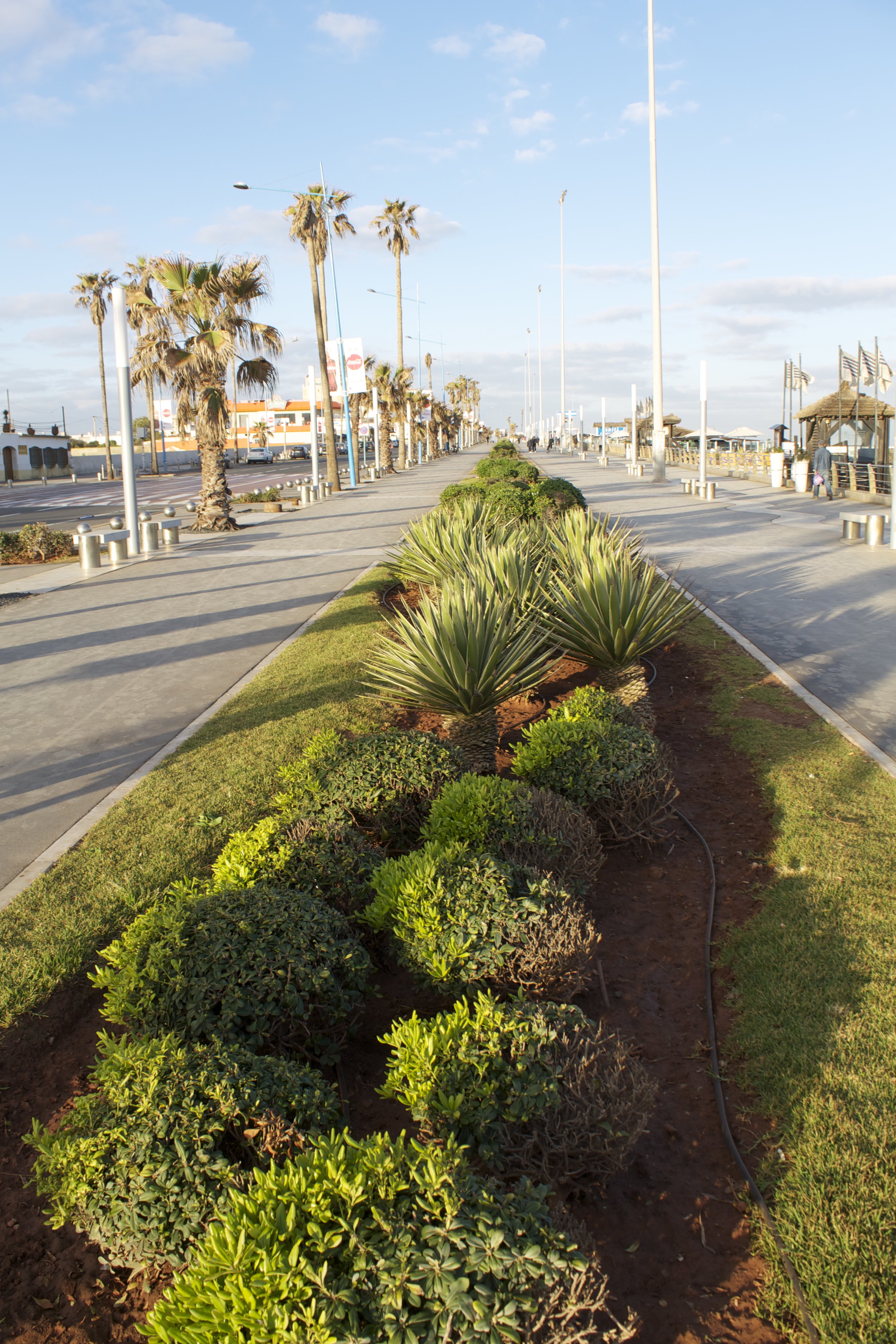 Boulevard de la Corniche, Dar-el-Beida, Morocco